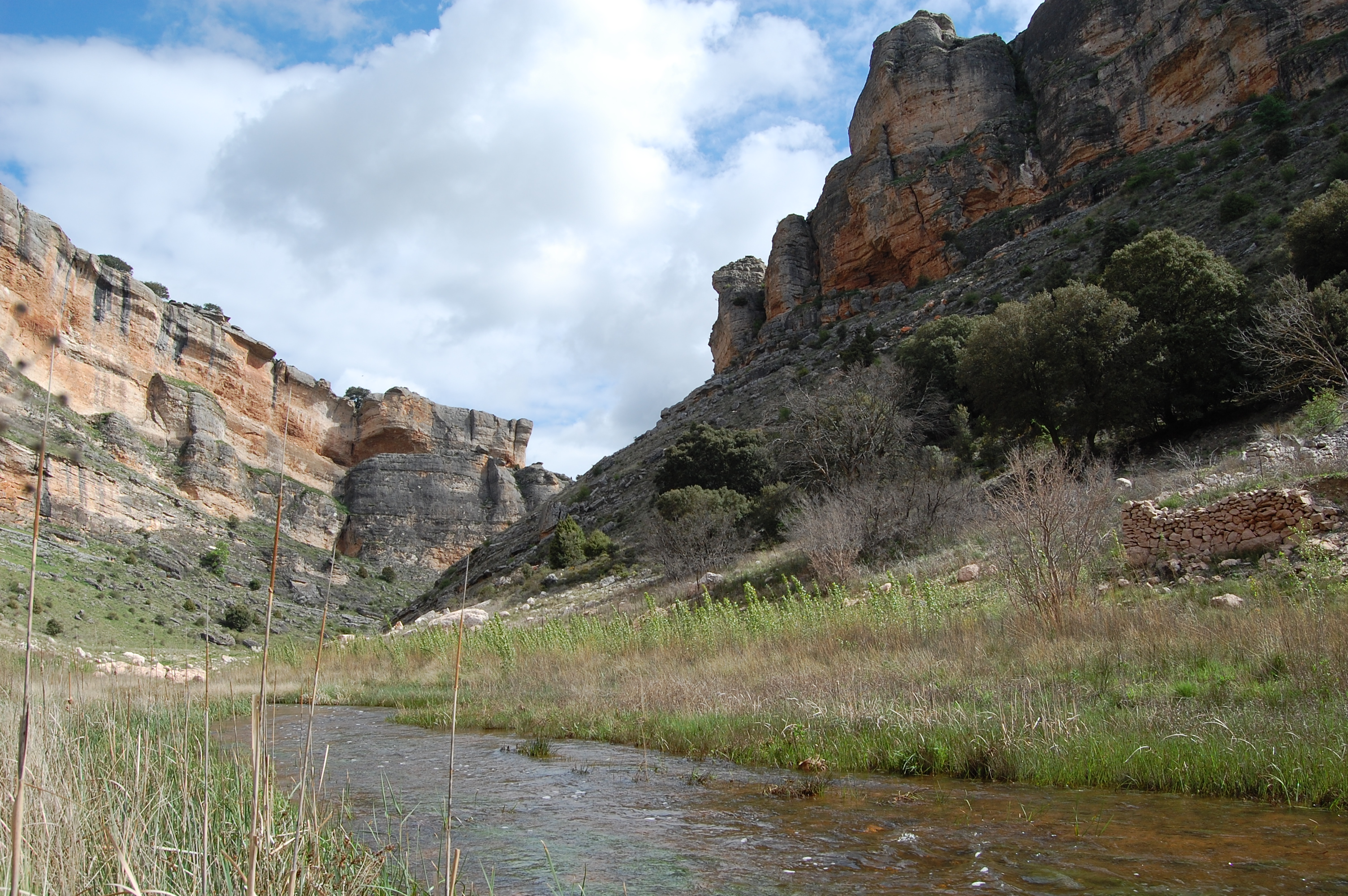 Río Salado